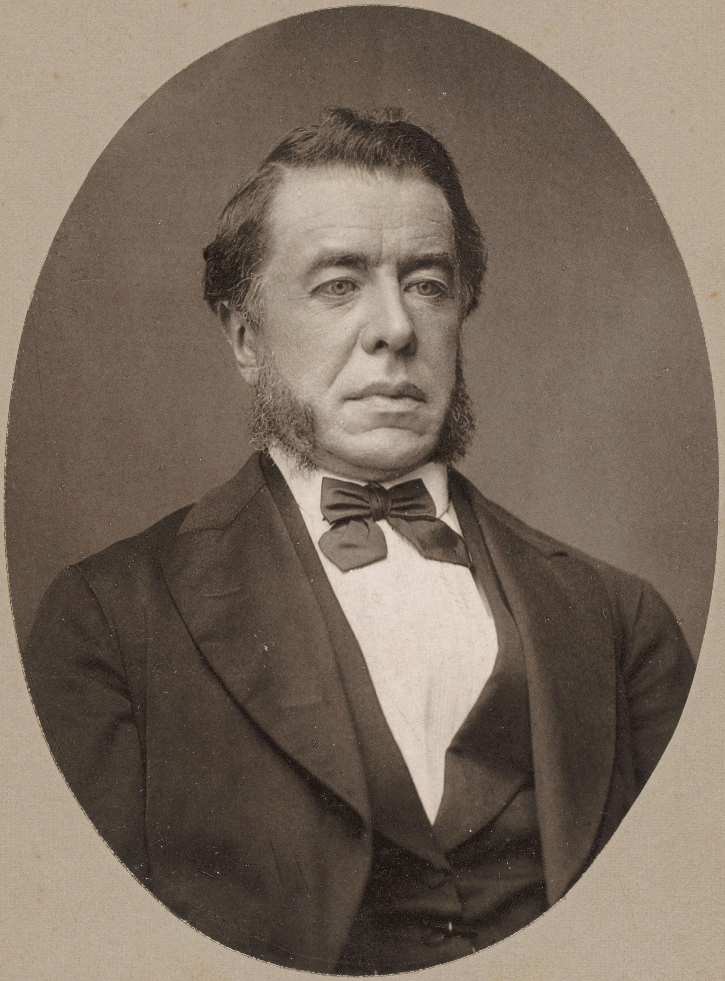 IdentificatieTitel(s): Portret van de historicus Robert FruinRobert Fruin, professor in de geschiedenis te Leiden had Europeesche vermaardheid (titel op object)Objecttype: foto kabinetfoto Objectnummer: RP-F-F01472Opschriften / Merken: annotatie, verso, met inkt geschreven: ‘Robert Fruin, professor in de geschiedenis te Leiden had Europeesche vermaardheid’signatuur, onder, gedrukt: ‘Goedejaa Hof fotograaf Leiden Hoogewoerd’VervaardigingVervaardiger: fotograaf: Jan Goedeljee (vermeld op object)Plaats vervaardiging: LeidenDatering: 1875 - 1900Fysieke kenmerken: lichtdrukMateriaal: papier Techniek: lichtdrukAfmetingen: foto: h 124 mm × b 89 mmblad: h 166 mm × b 108 mmOnderwerpWat: historical disciplines; philology (+ portrait of scholar, scientist)Verwerving en rechtenVerwerving: overdracht van beheer 1994Copyright: Publiek domein